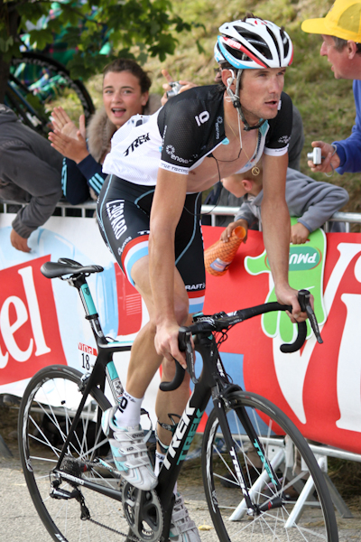 Frank Schelck